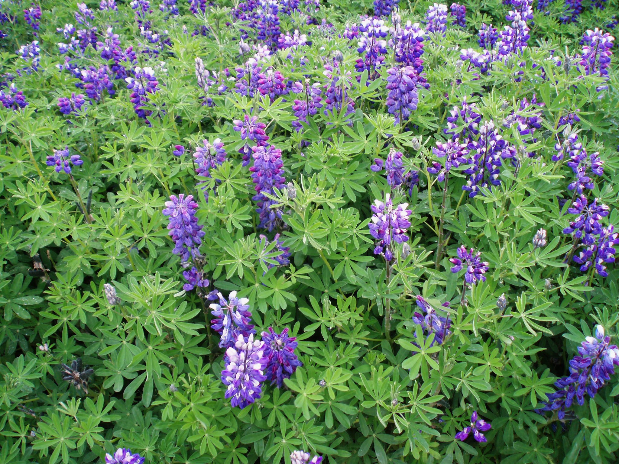 Alaska-Lupinen (Lupinus nootkatensis) in Island